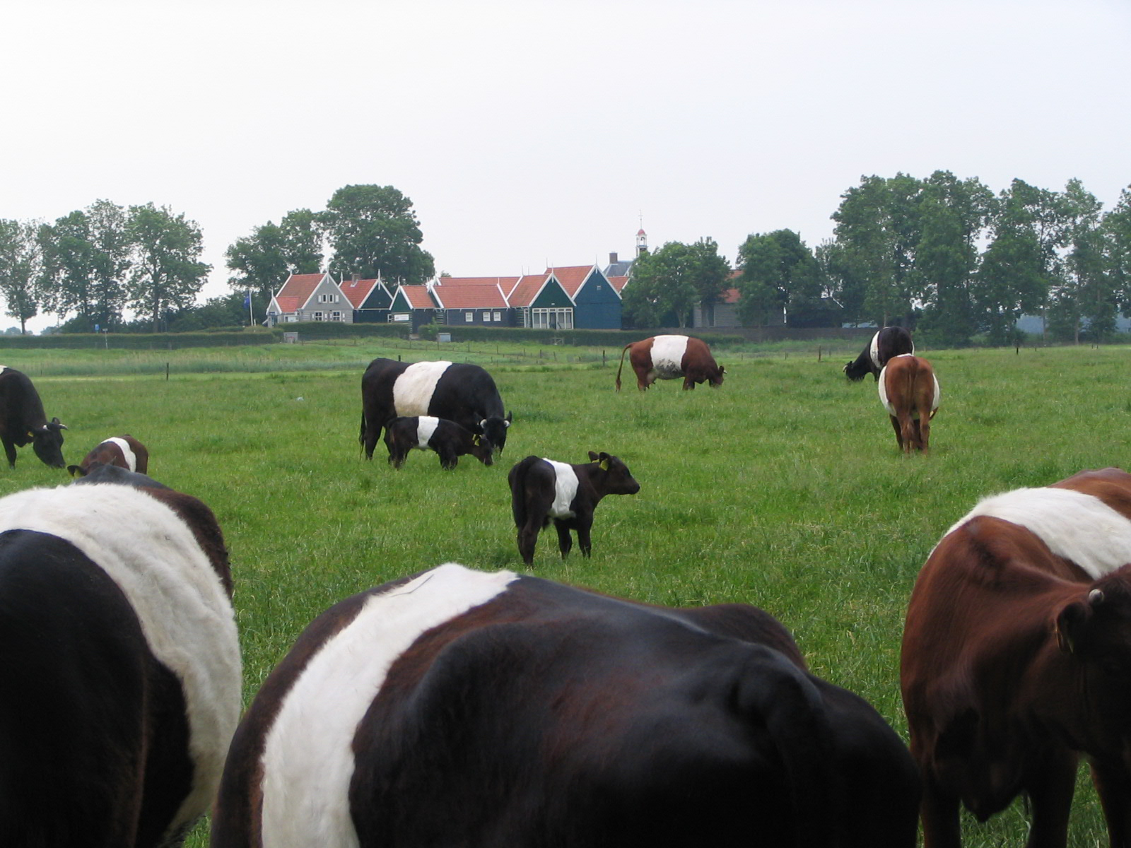 Lakenvelders bij Schokland